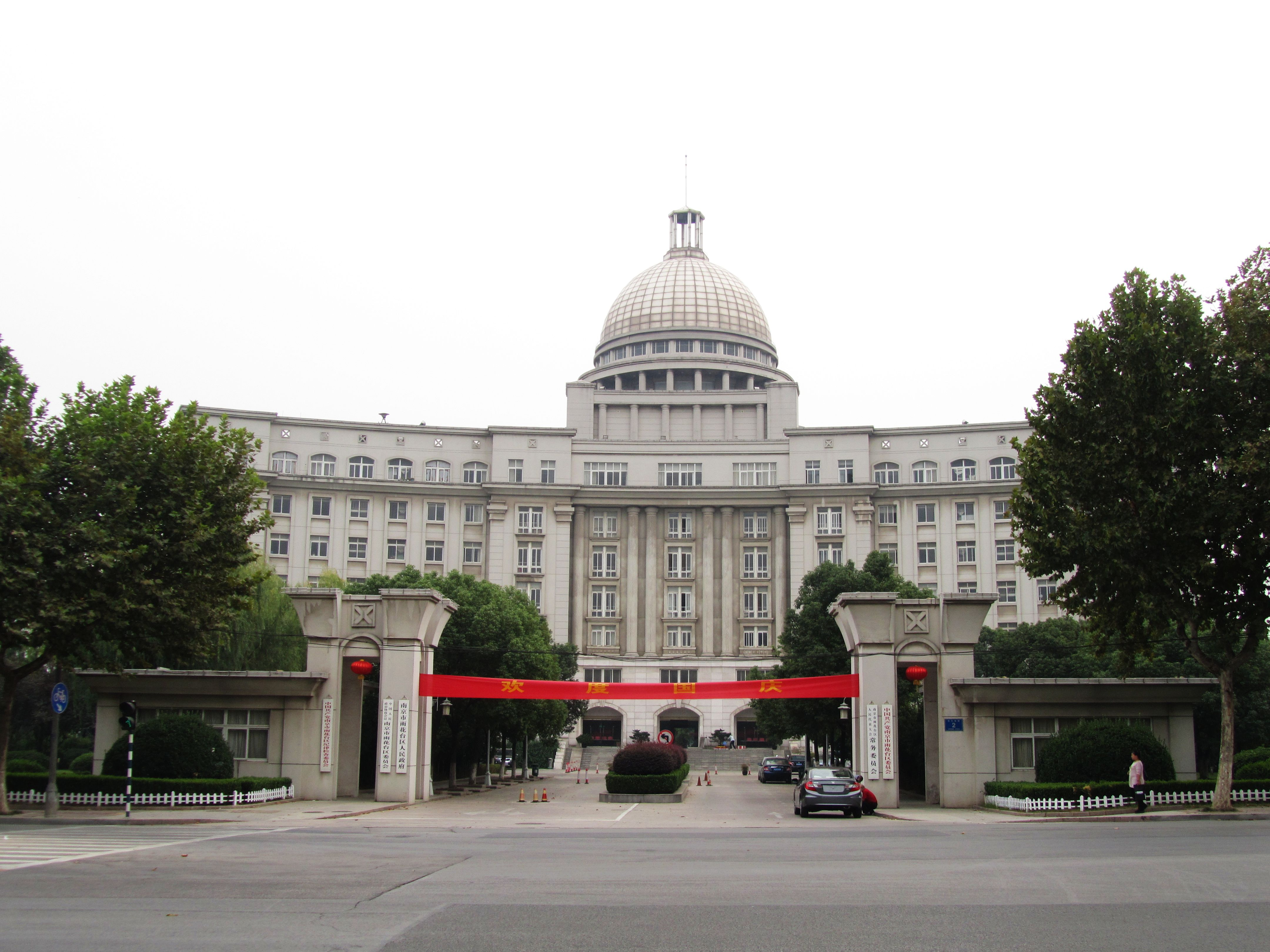 南京雨花台区政府大楼。